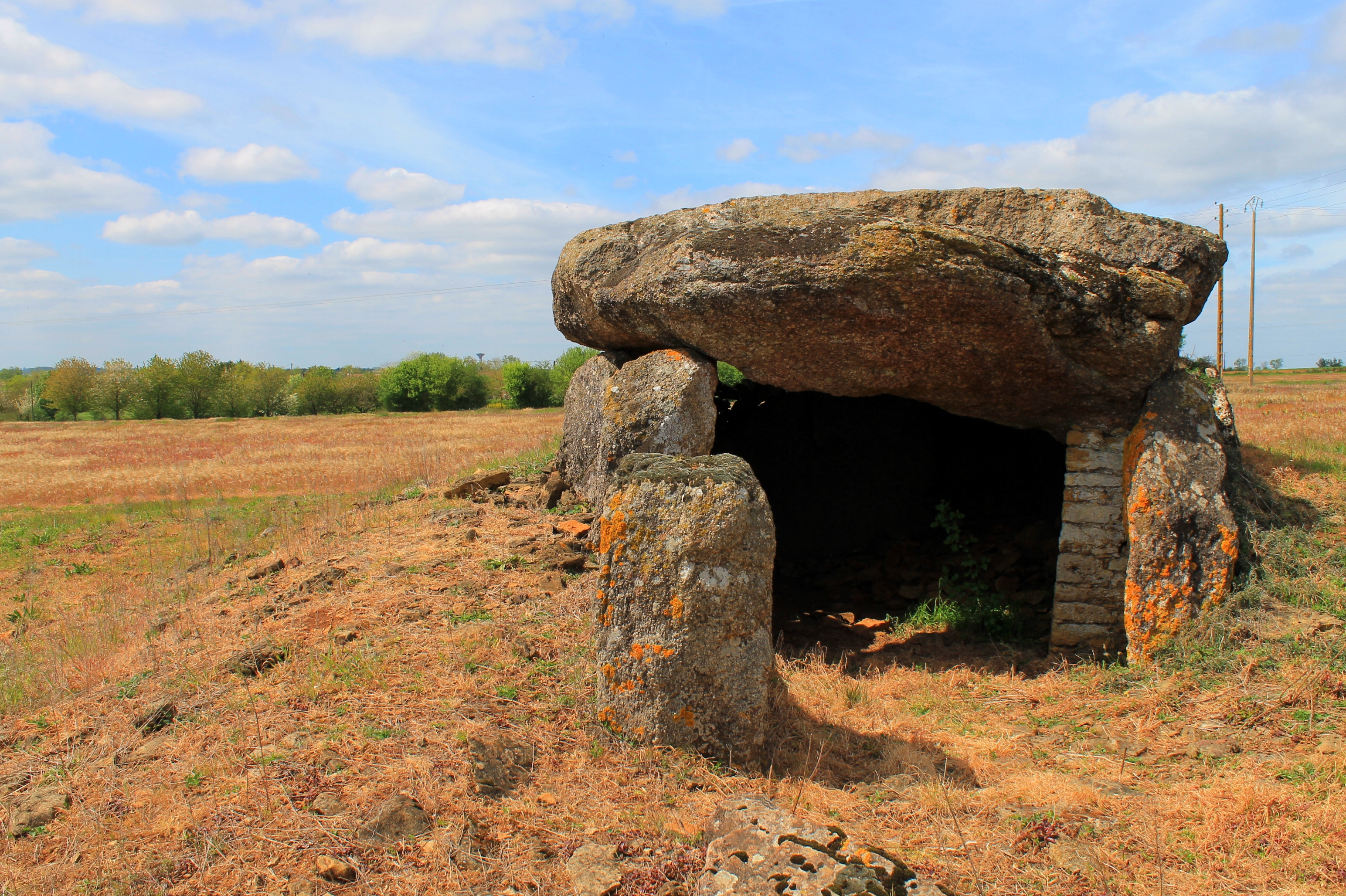 Dolmen des Landes